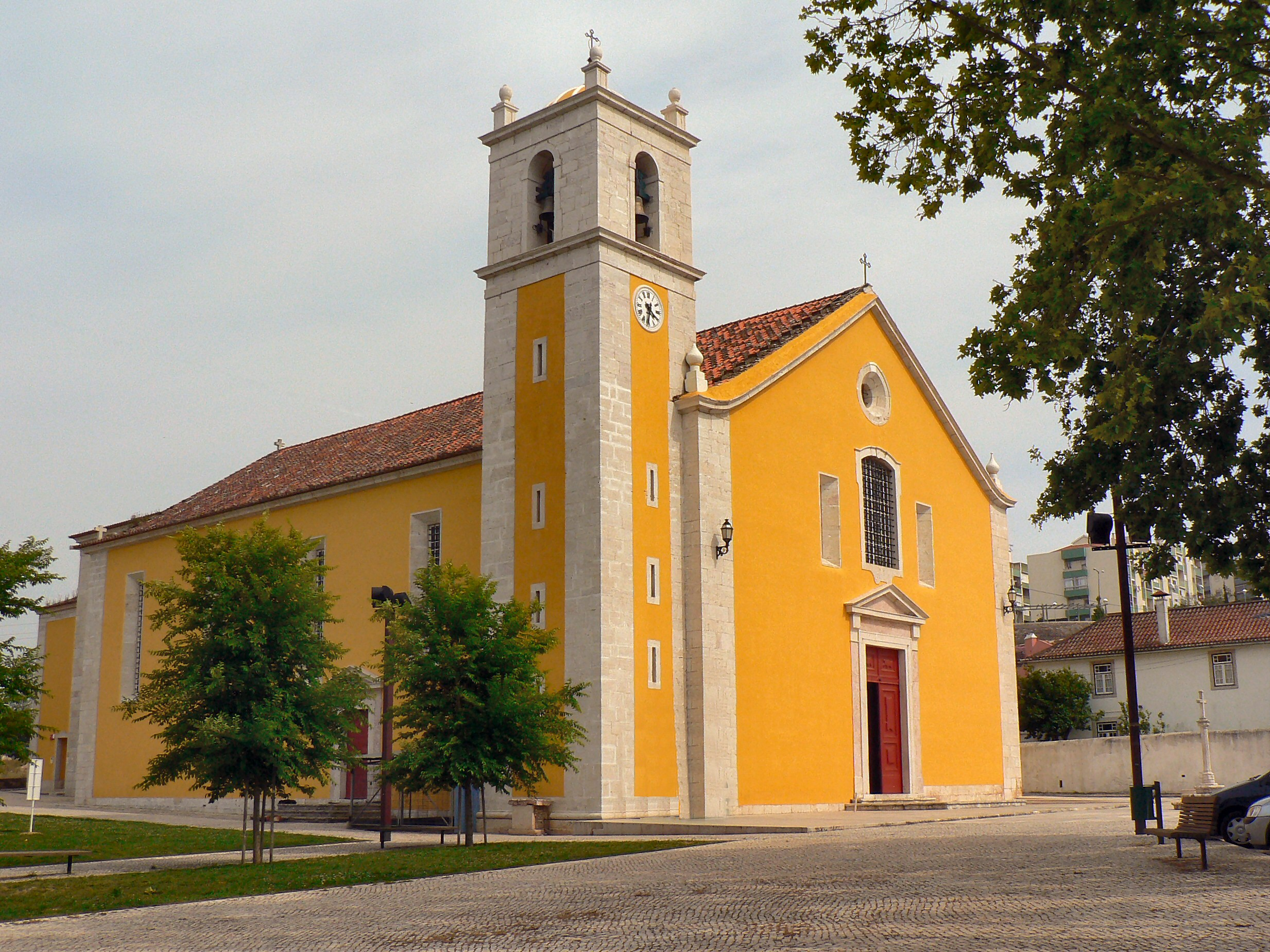 Igreja Matriz de Loures